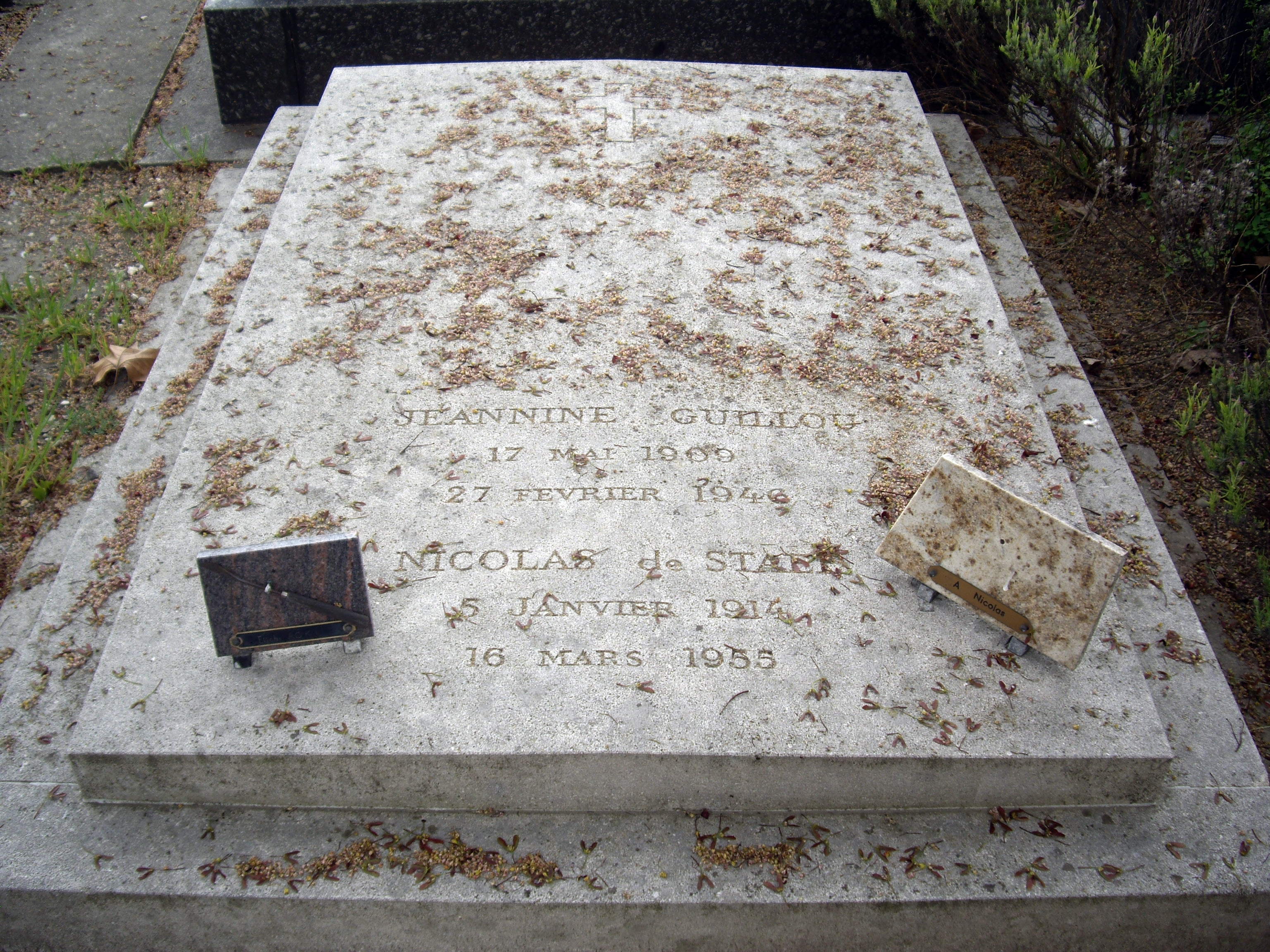 Tombe de Nicolas de Staël et de sa compagne Jeannine Guillou, cimetière de Montrouge, division 58.